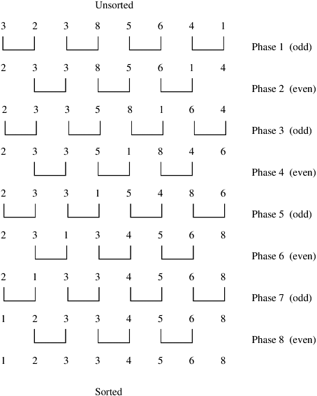 Алгоритам сортирања